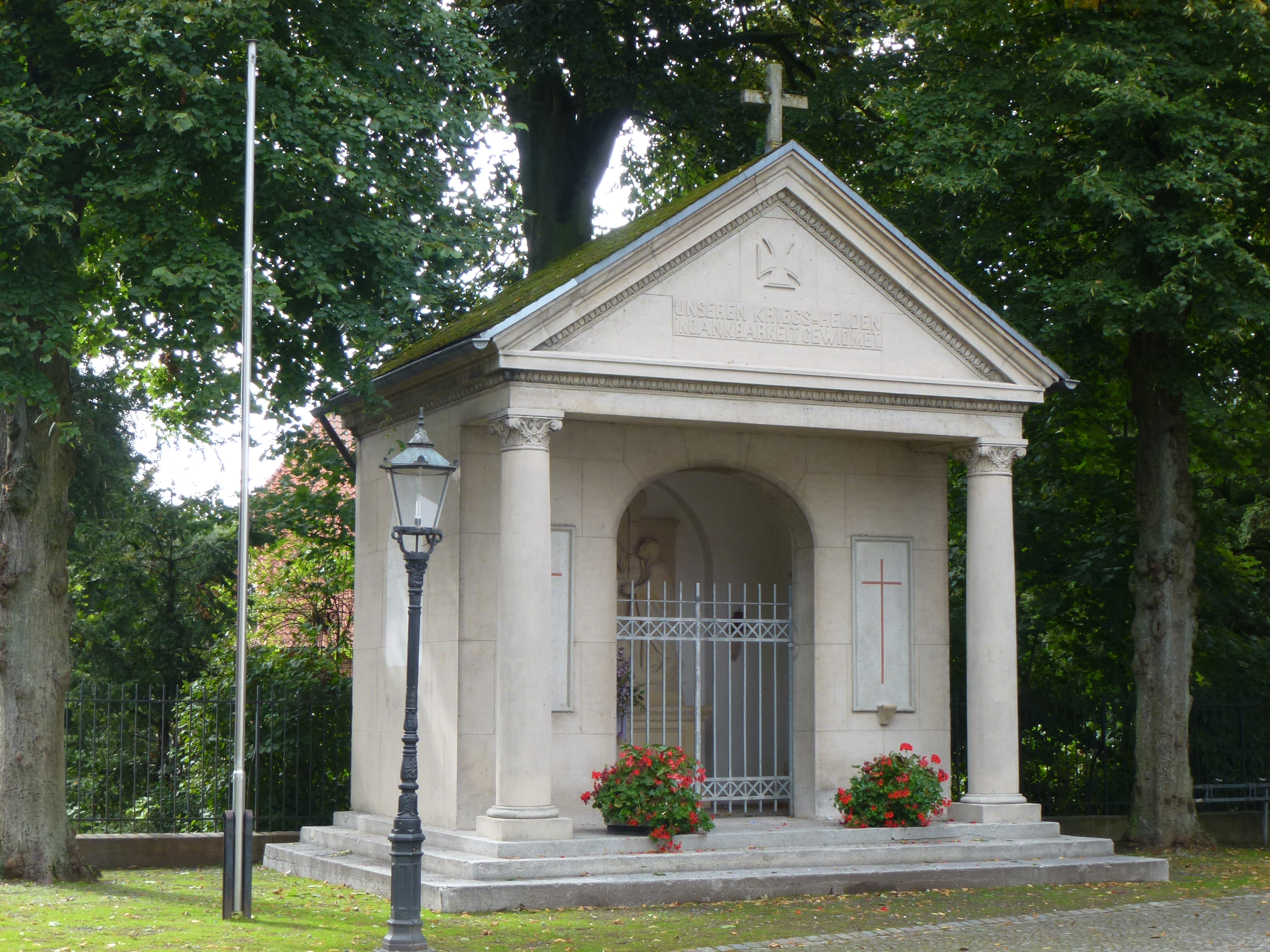 Kriegergedächniskapelle, Marienplatz, Nottuln-Appelhülsen This is a photograph of an architectural monument.